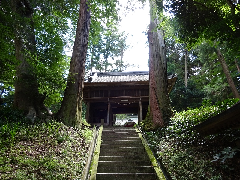 俵田白山神社